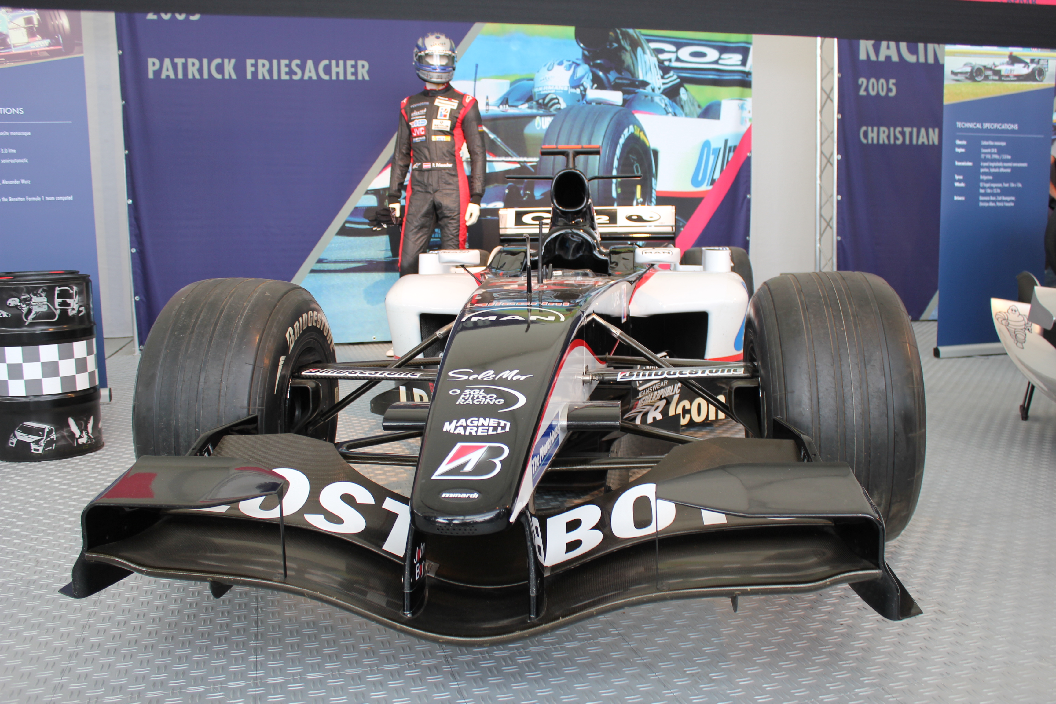 Ein Minardi PS05 von vorne